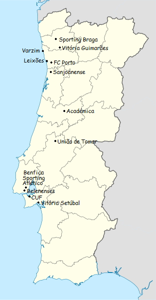 Carta dos clubes participantes do campeonato de portugal de futebol de primeira divisao 1968-1969